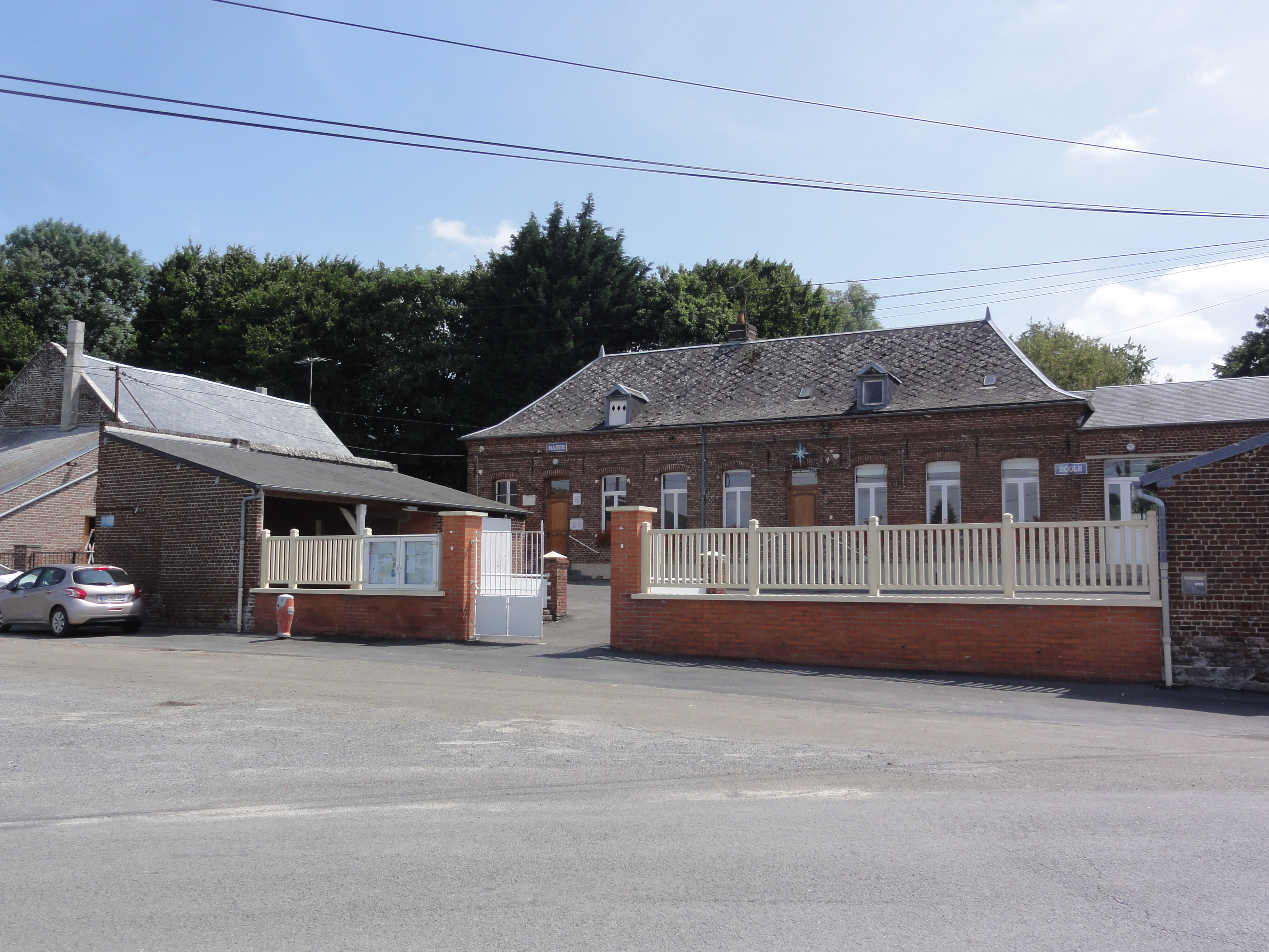 Aisonville-et-Bernoville (Aisne) mairie